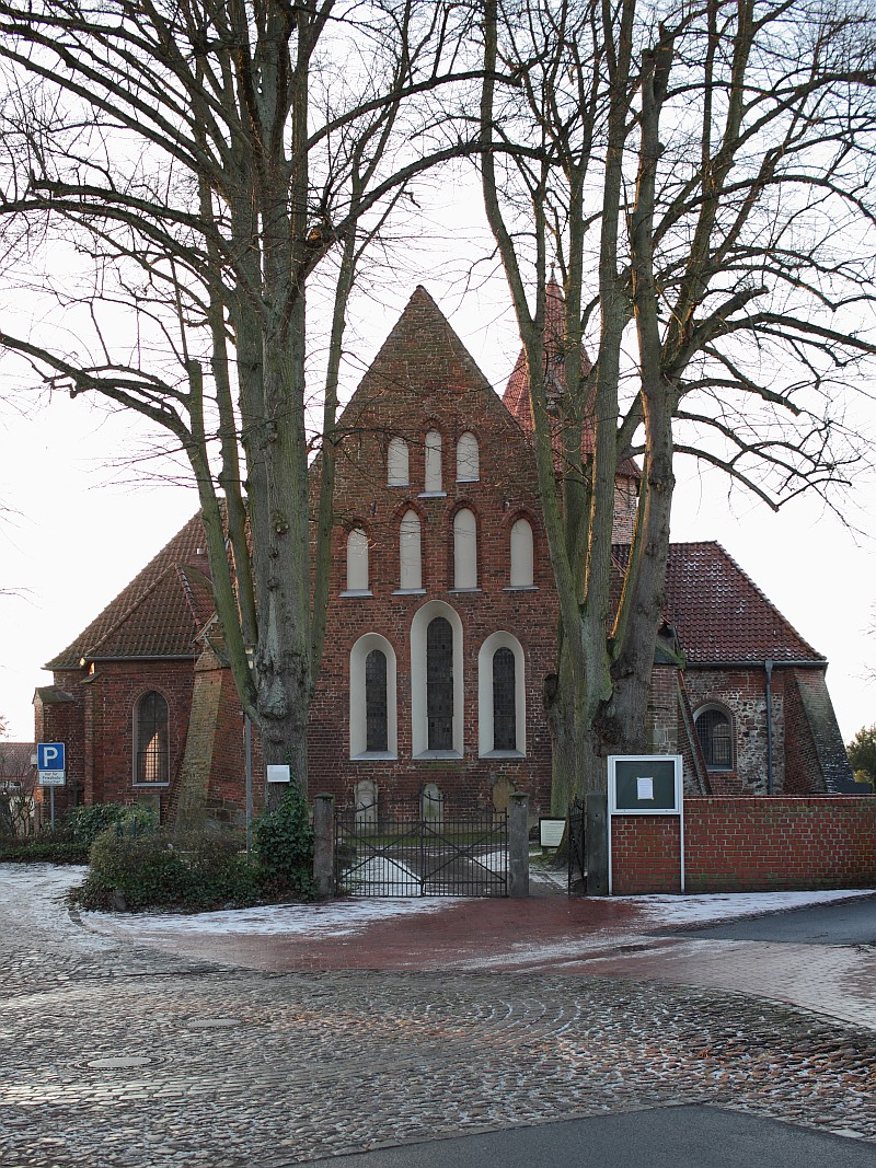 St. Laurentius Kirche in Achim (Landkreis Verden)